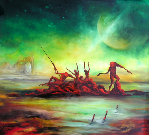 Hinterglasbild